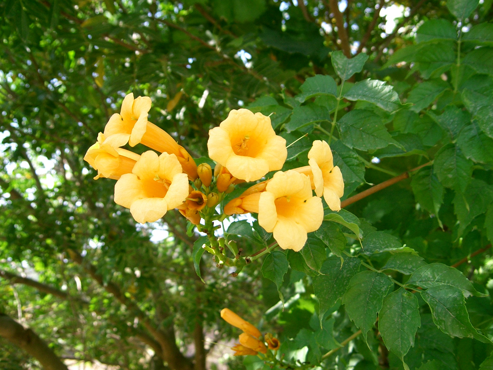 Bignònia. Campsis radicans. Son Carrió, Mallorca.